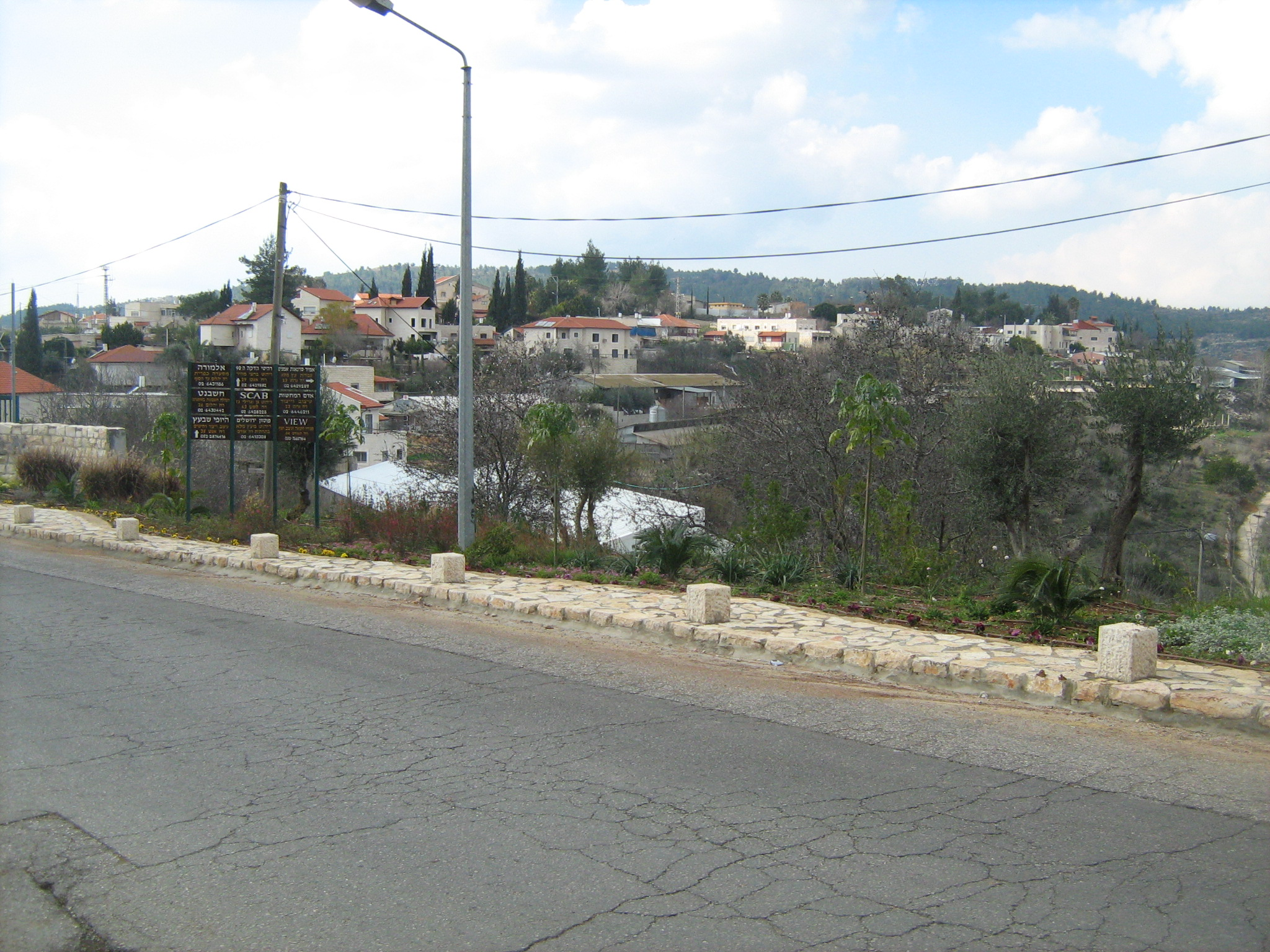 הכנסיה למושב אבן ספיר